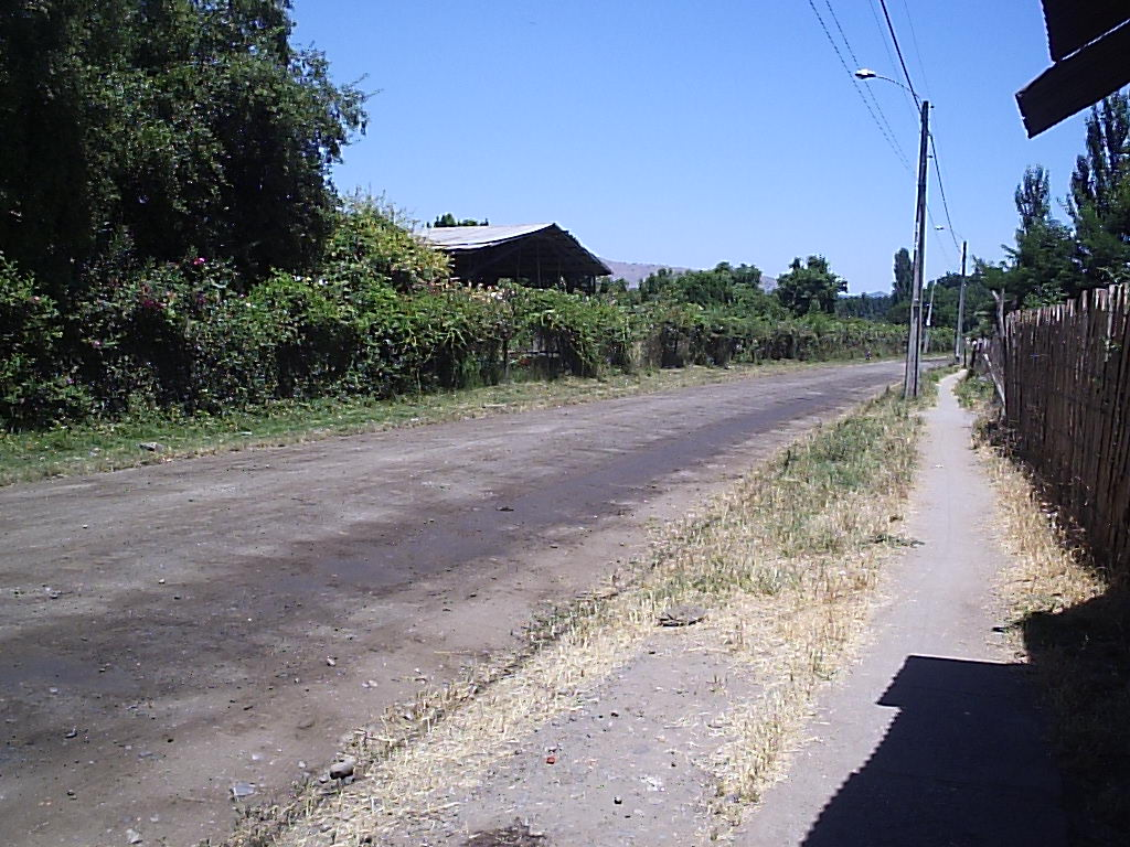 Paisaje de Salsipuedes, pequeño poblado de la VI Región en Chile